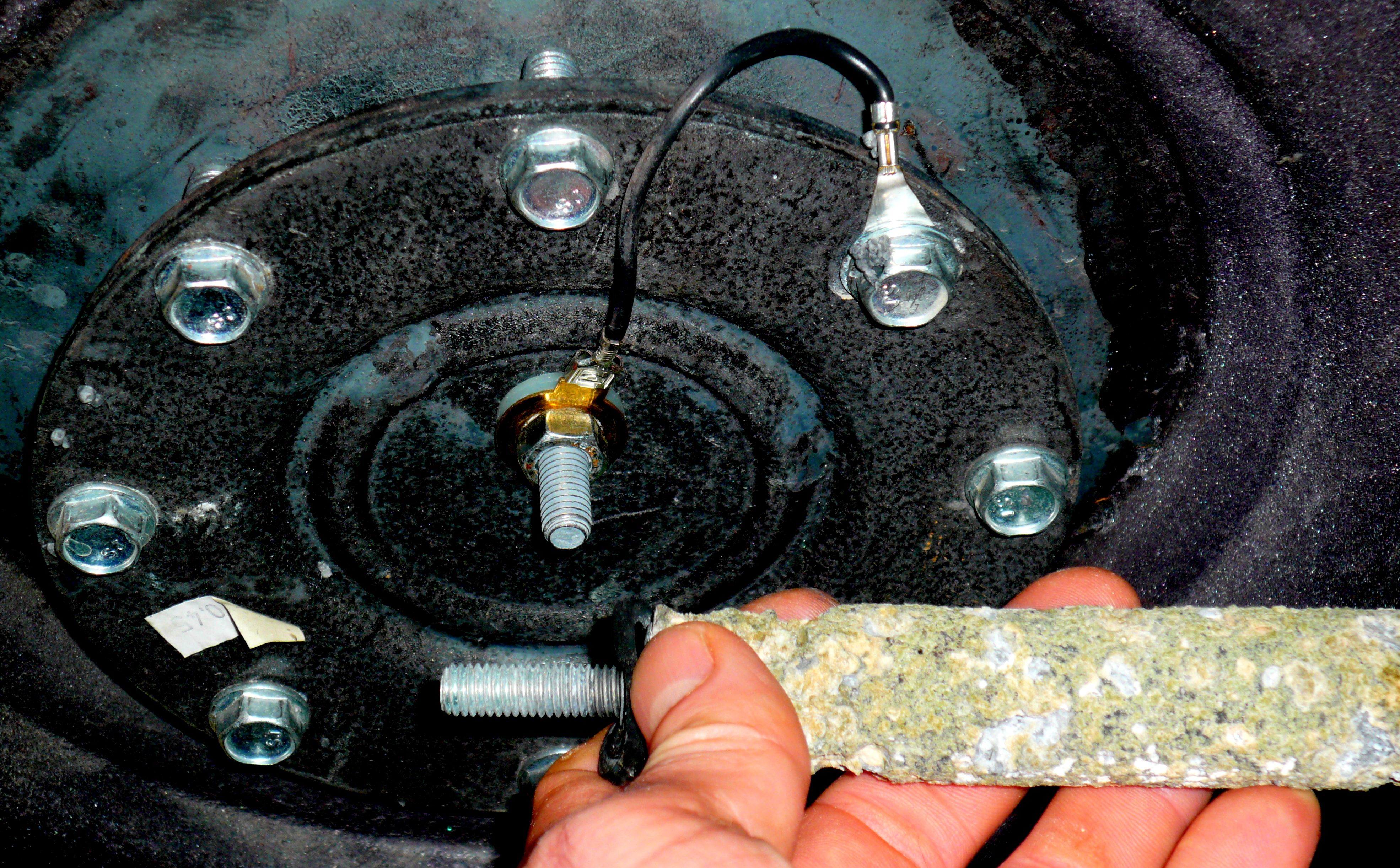 Deckel eines Boiler mit kathodischem Korrosionsschutz mit einer gebrauchen Anode aus Magnesium für eine Warmwasserbereitung